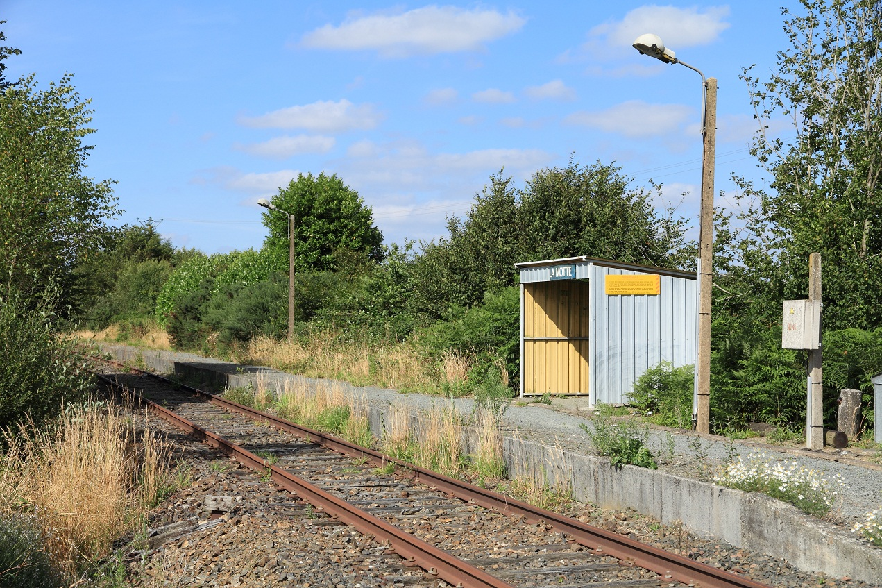 Vue de la gare de La Motte en juillet 2012, Bretagne, France.